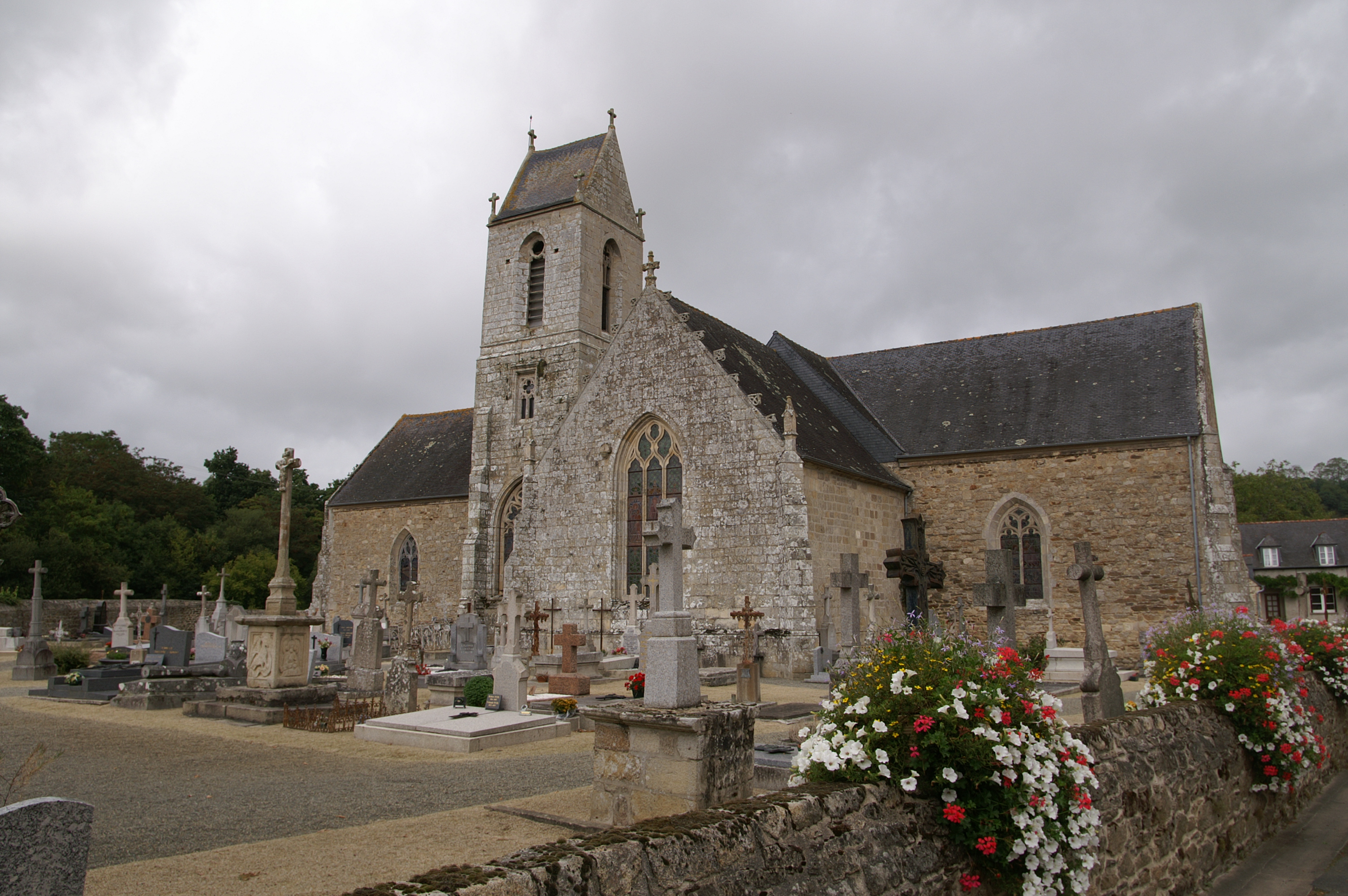 Église Notre-Dame de Jugon-les-Lacs : façade sud.